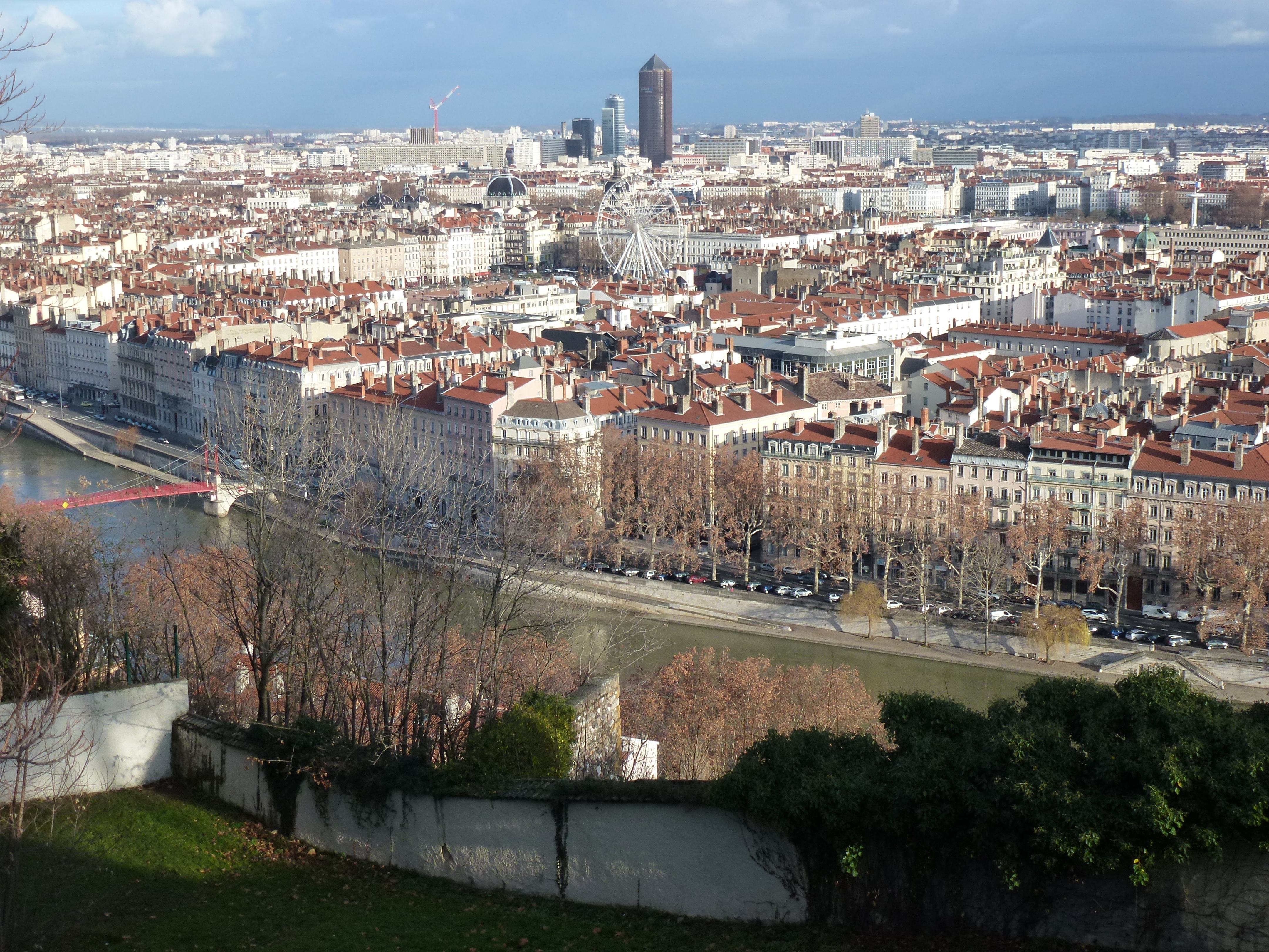 Le jardin des Curiosités à Lyon (5ème) - Vue sur Lyon